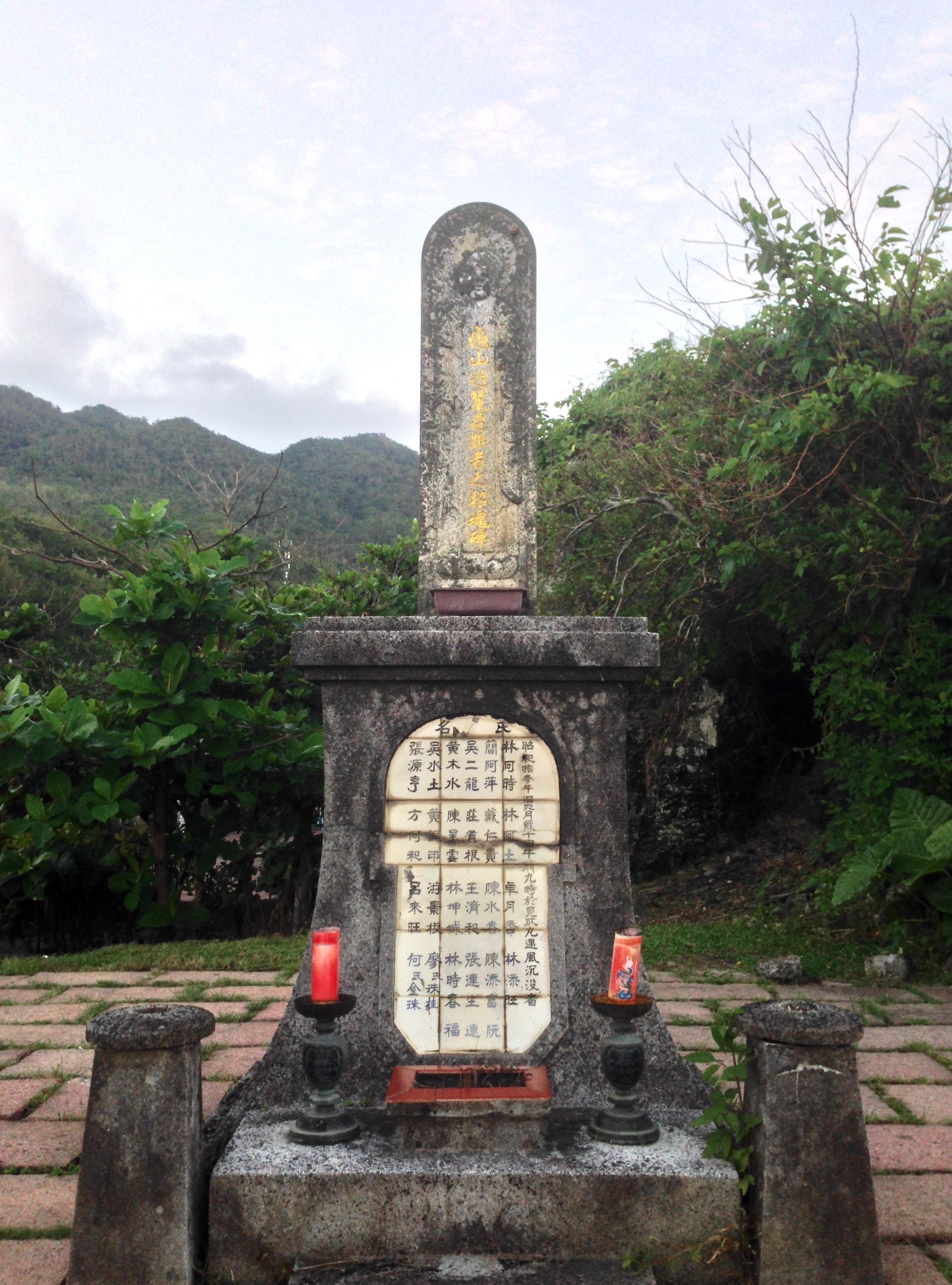 中文（台灣）: 大溪漁港龜山島遊覽遭難者之招魂碑